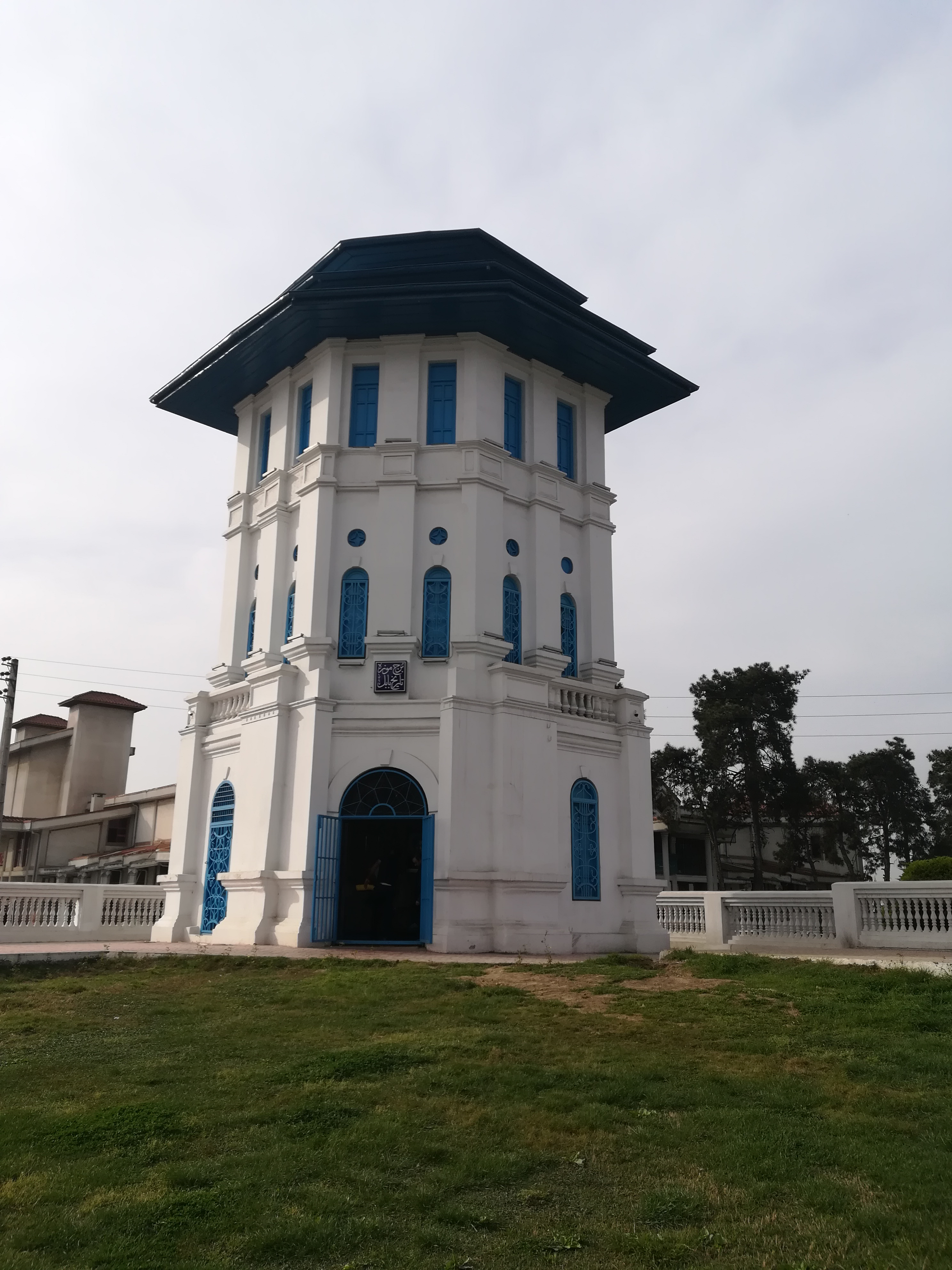 برج دیدبانی کاخ بابل